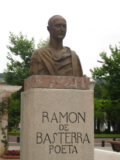 Ramón de Basterra, escultura en Bilbao